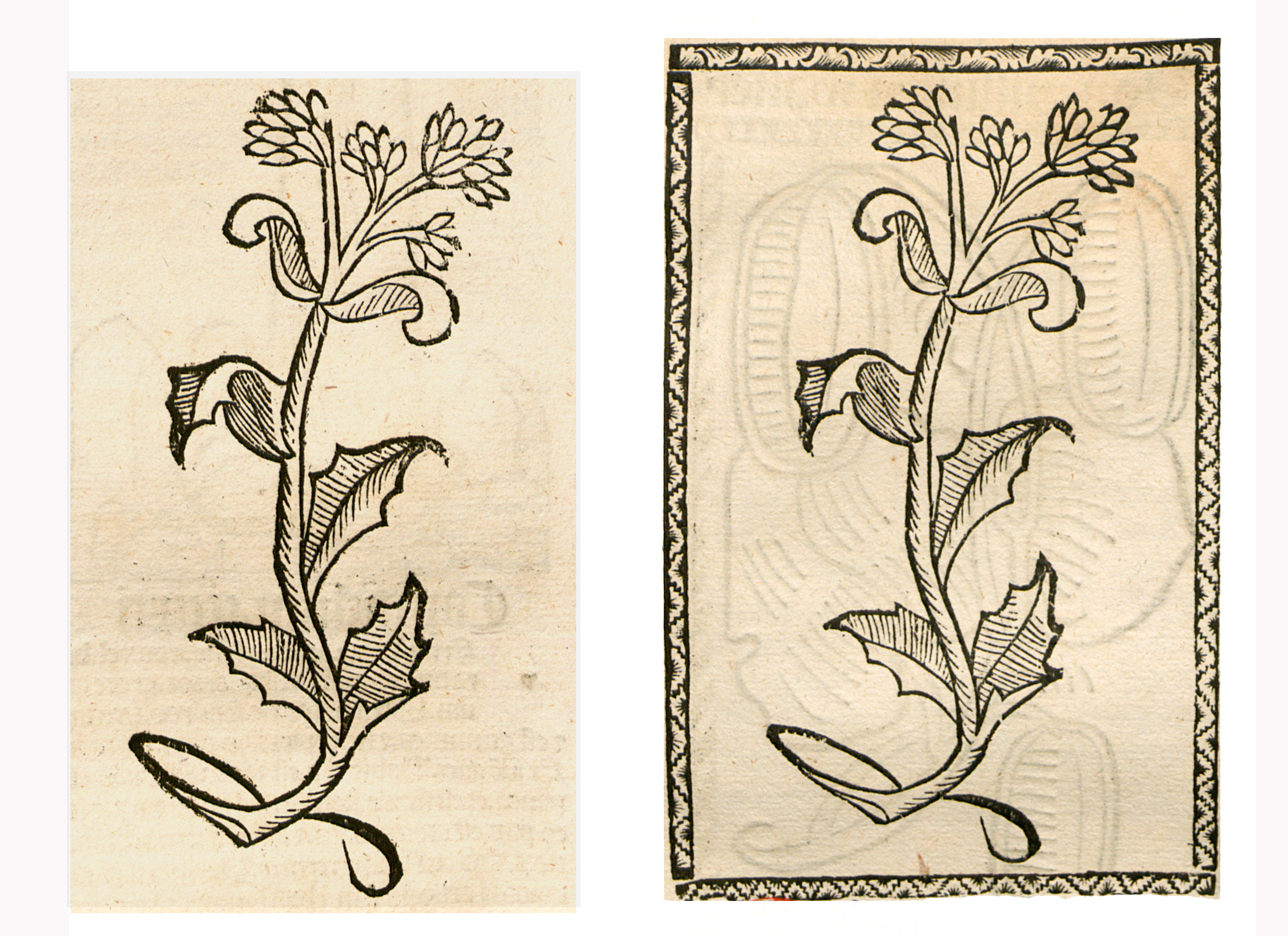 Abbildung von: Muer Pfeffer (Sedum album)